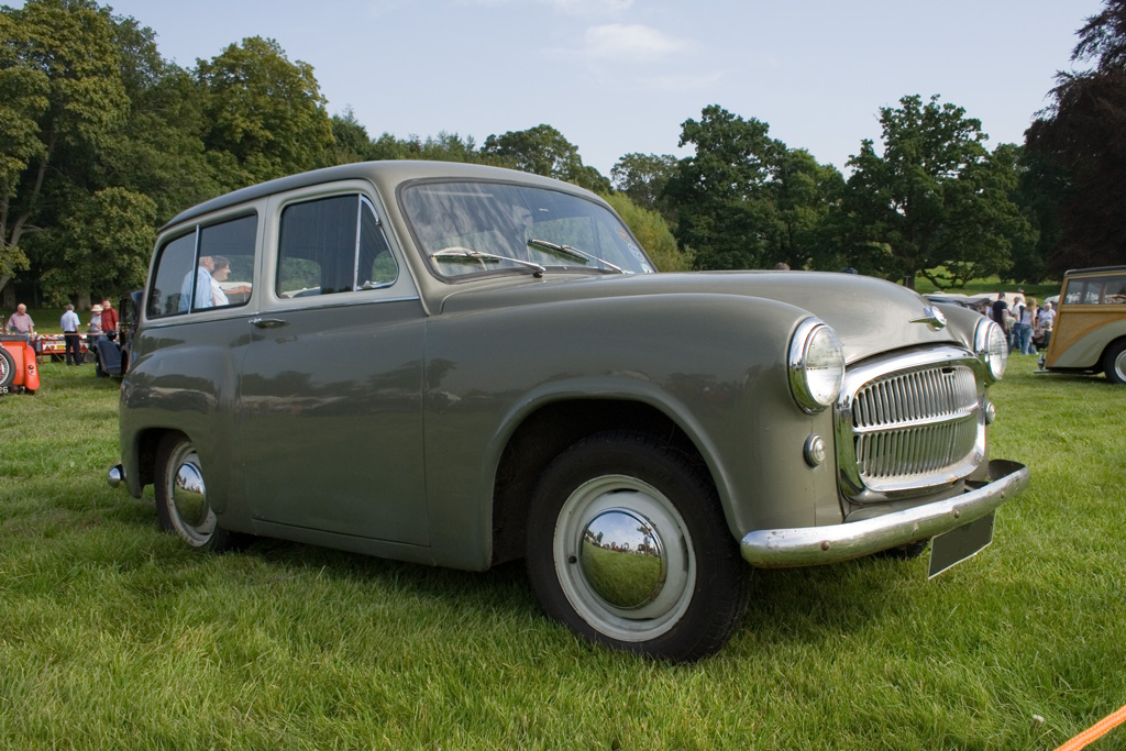 Hillman Husky "Mark 1"